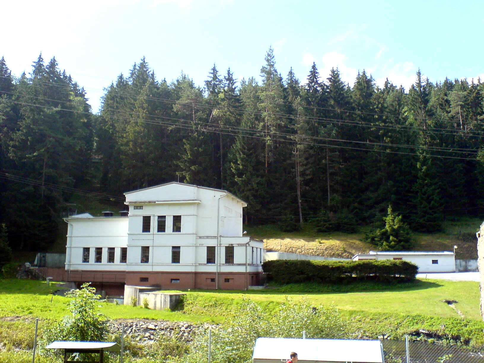 Přehrada Soběnov - budova elektrárny